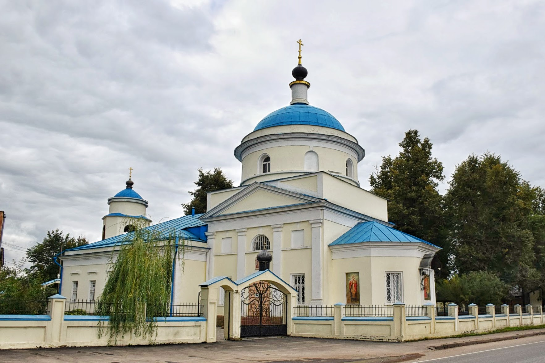 Церковь Казанской иконы Божией Матери: Молоково, Ленинский район, Московская область